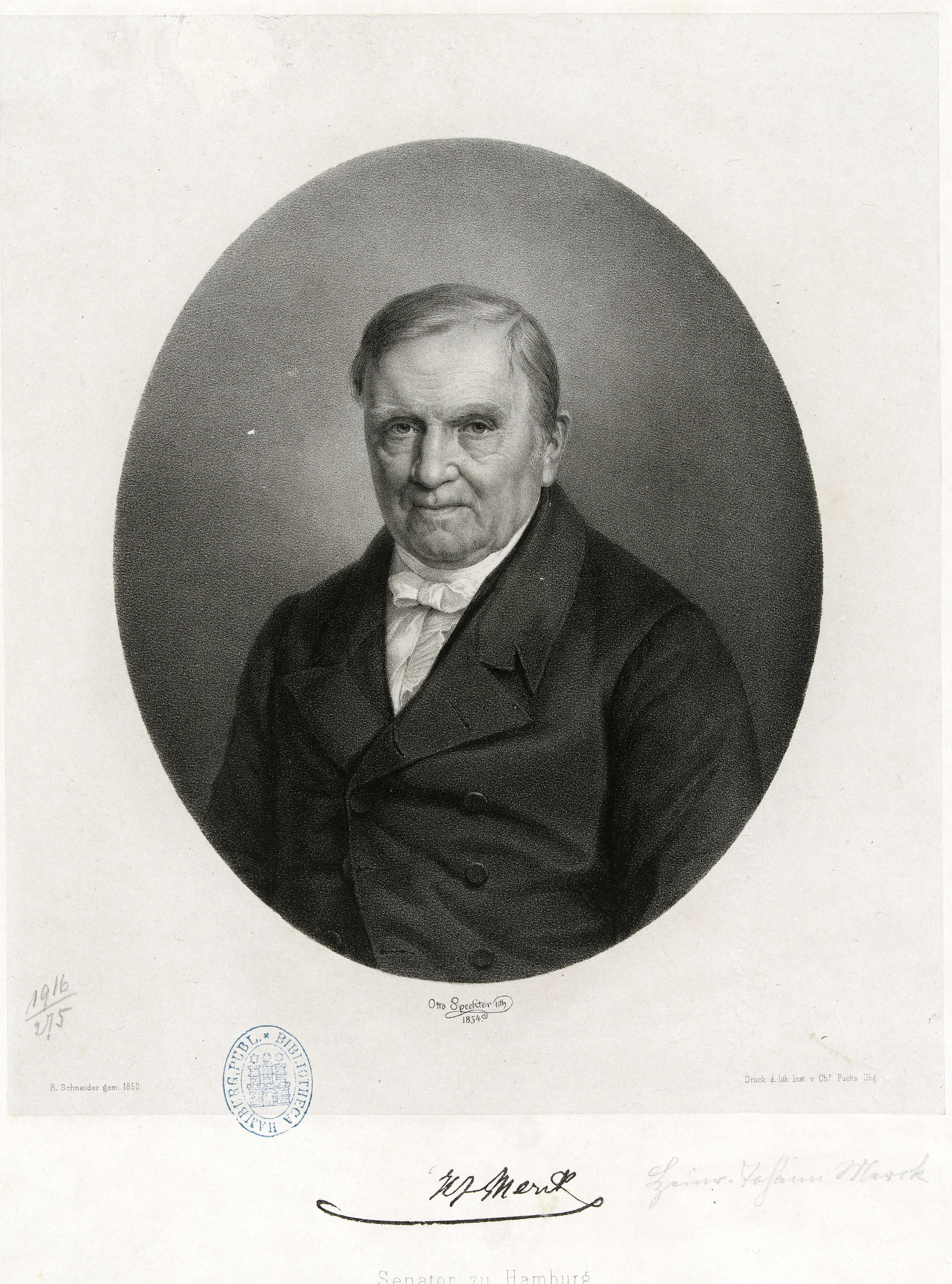 Bildnis von Heinrich Johann Merck